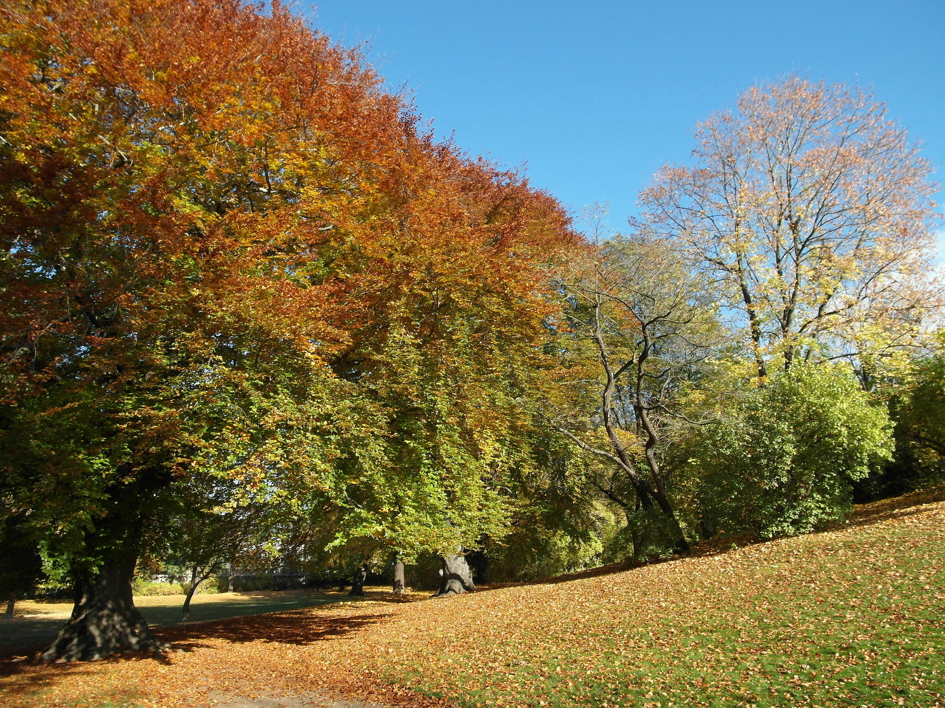 31.10.2012 01097 Dresden-Innere Neustadt, Kleine Marienbrücke / Große Meißner Straße: Palaisgarten am Japanischen Palais (GMP: 51.059854,13.737701). [SAM3378.JPG]20121031060DR.JPG(c)Blobelt